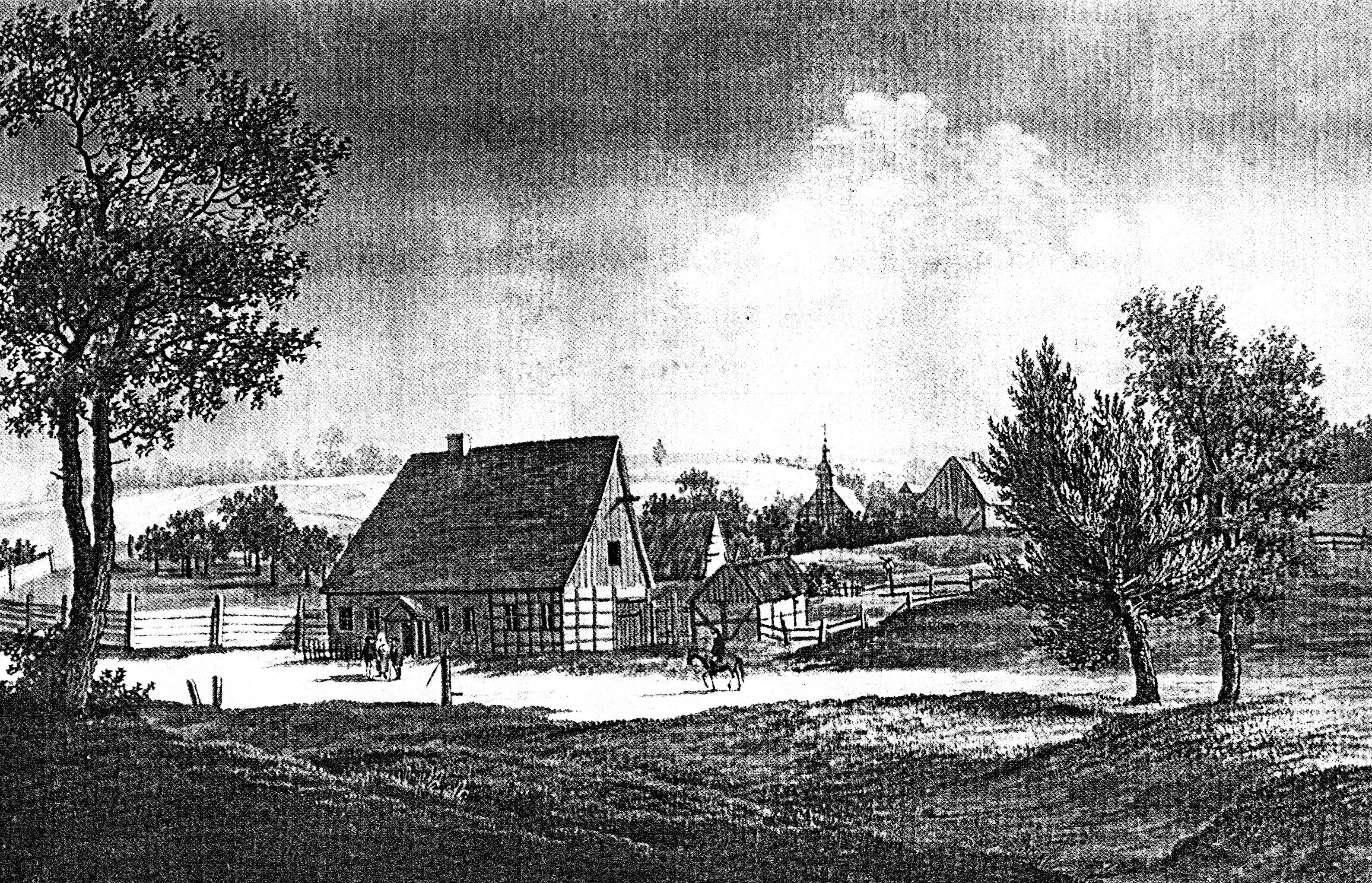 Die Pferdewechselstation »Sandkrug« in Glienicke auf einem Stich aus dem Jahre 1740. Im Hintergrund die erste Dorfkirche.